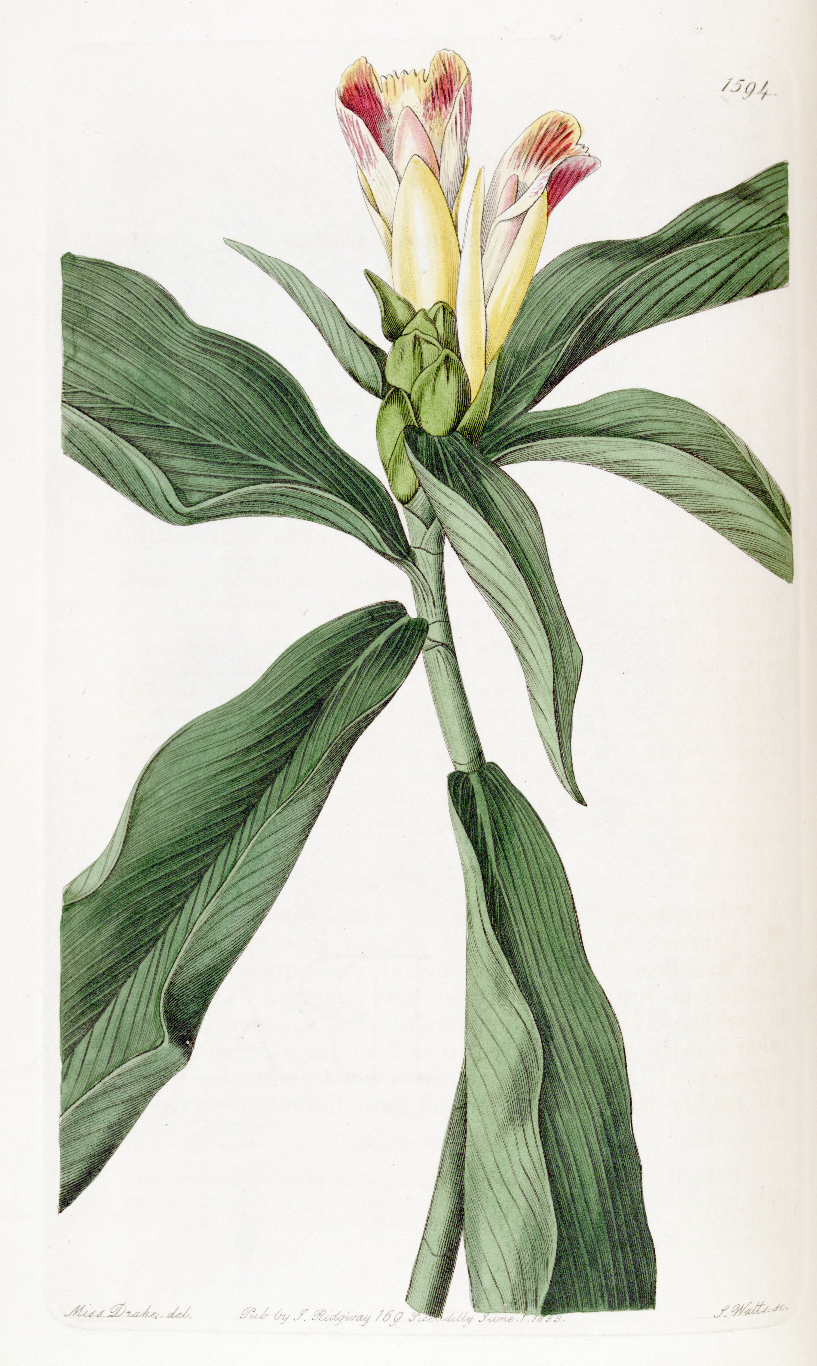 Photo extraite du livre “Edwards’s Botanical Register” publié en 1833 en page 1594 dans le volume 19 édité par James Ridgway, 169 Picadilly.